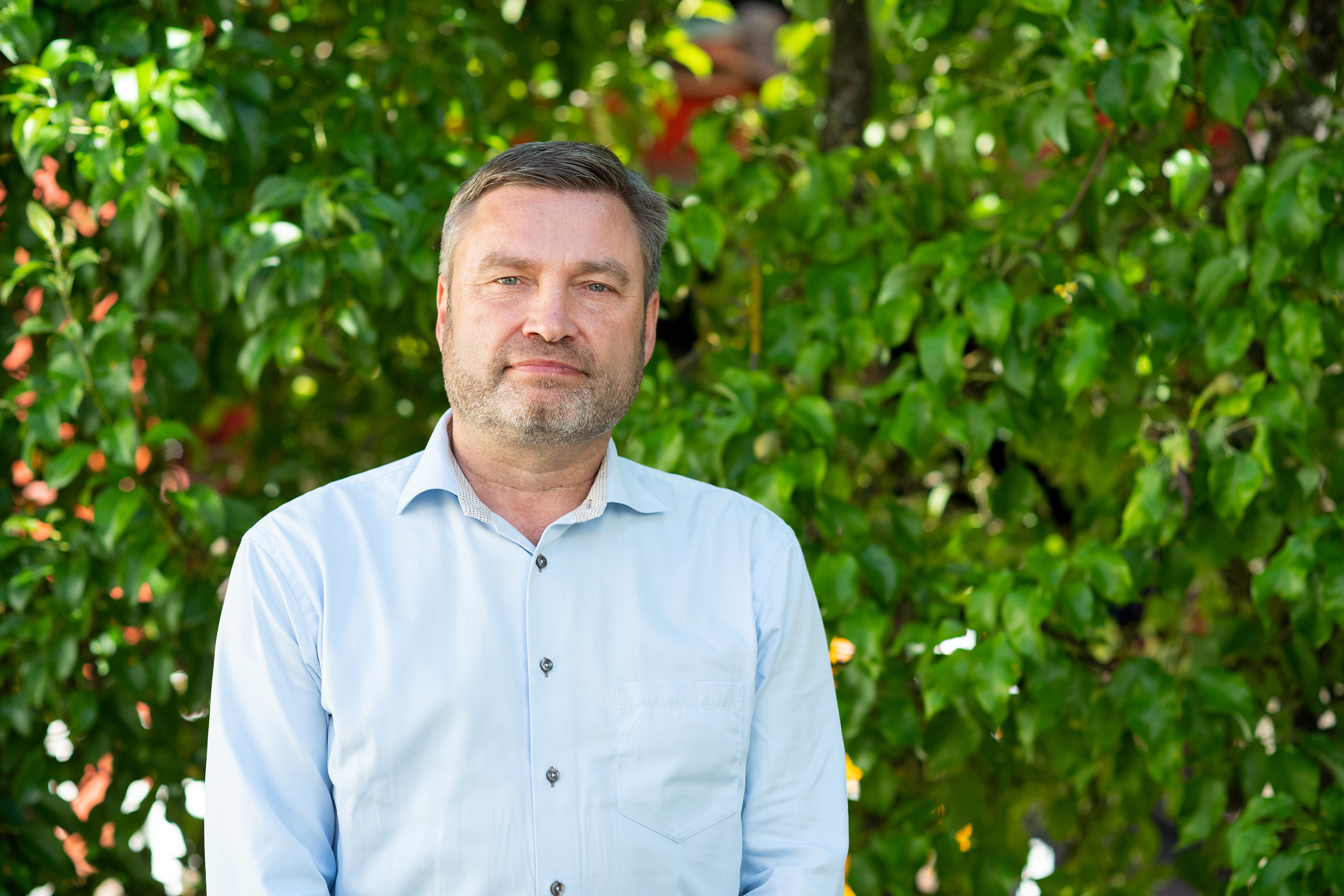 Peter Helander, Riksdagsledamot för Centerpartiet.